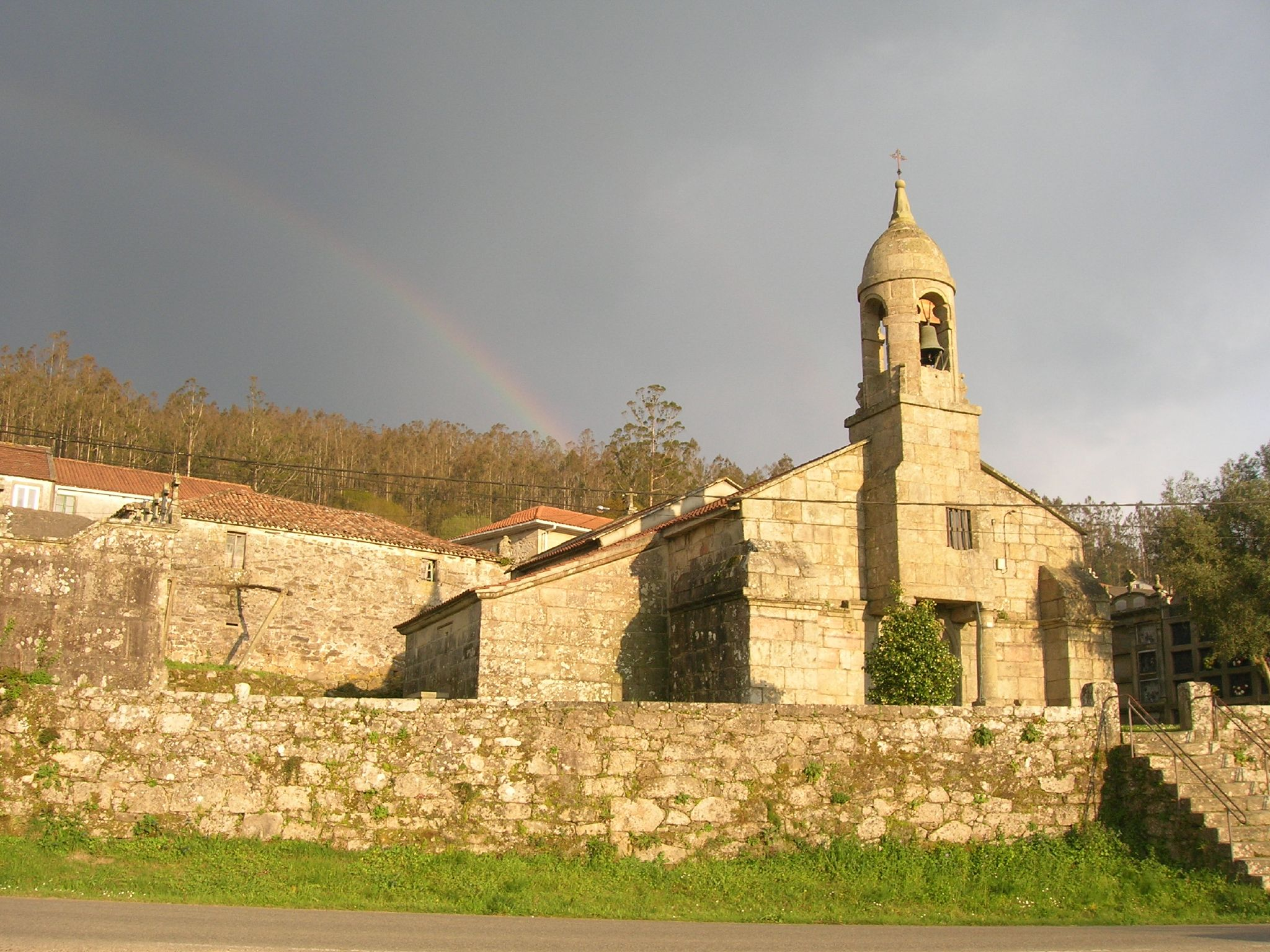 Igrexa de Santa Mariña de Barcala, no concello da Estrada